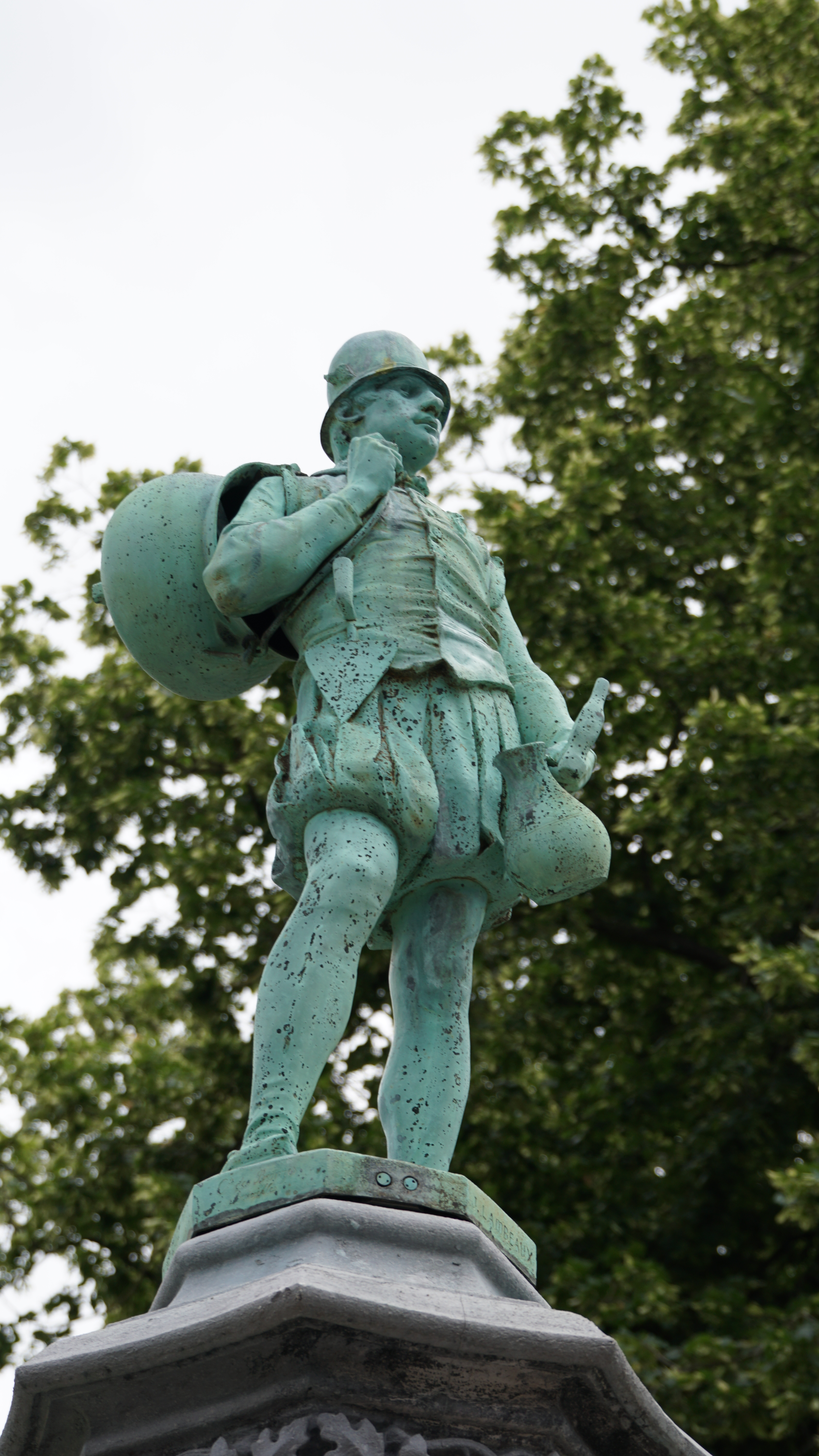 De Ketelmakers of Koperslagers en Bronsgieters, door Jef Lambeaux